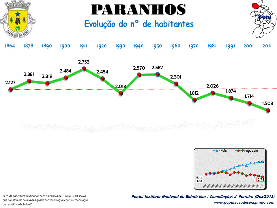 Evolução da População 1864 / 2011